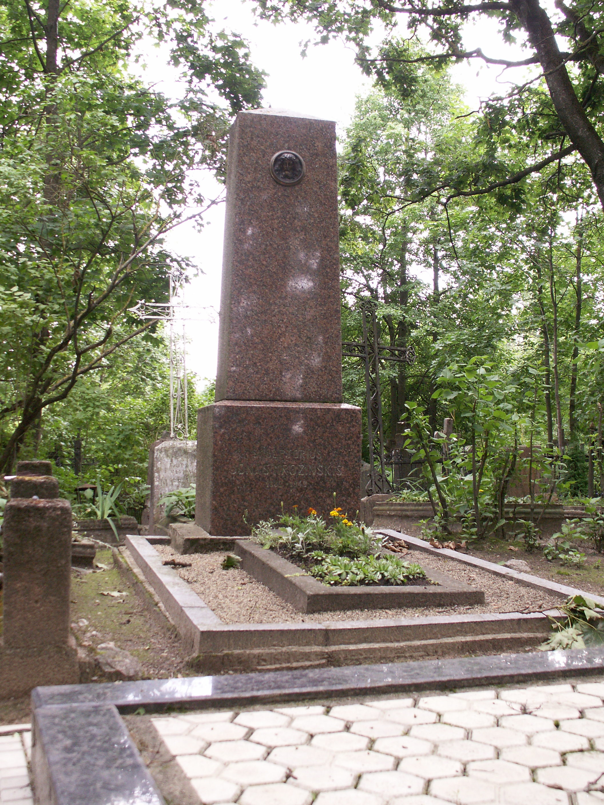 Šiaulių senosios kapinės. Skulptoriaus Jono Mrozinskio kapas